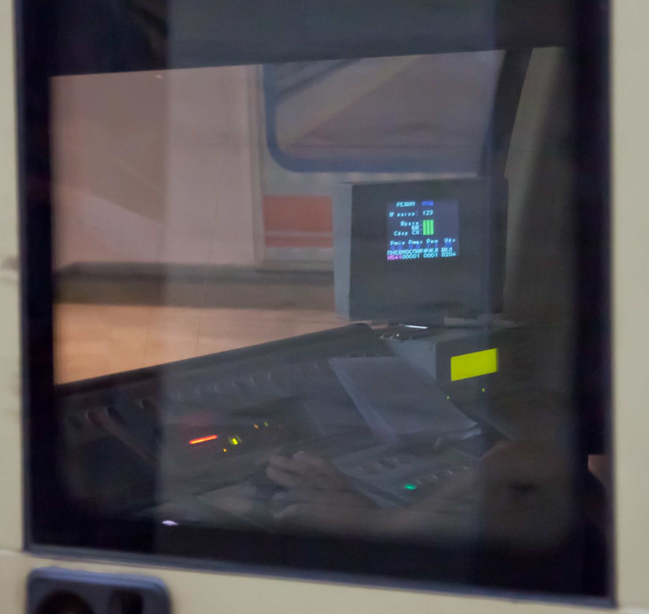 Sofia Metro